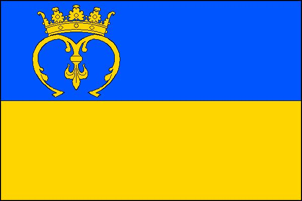 Vlajka obce Lodhéřov